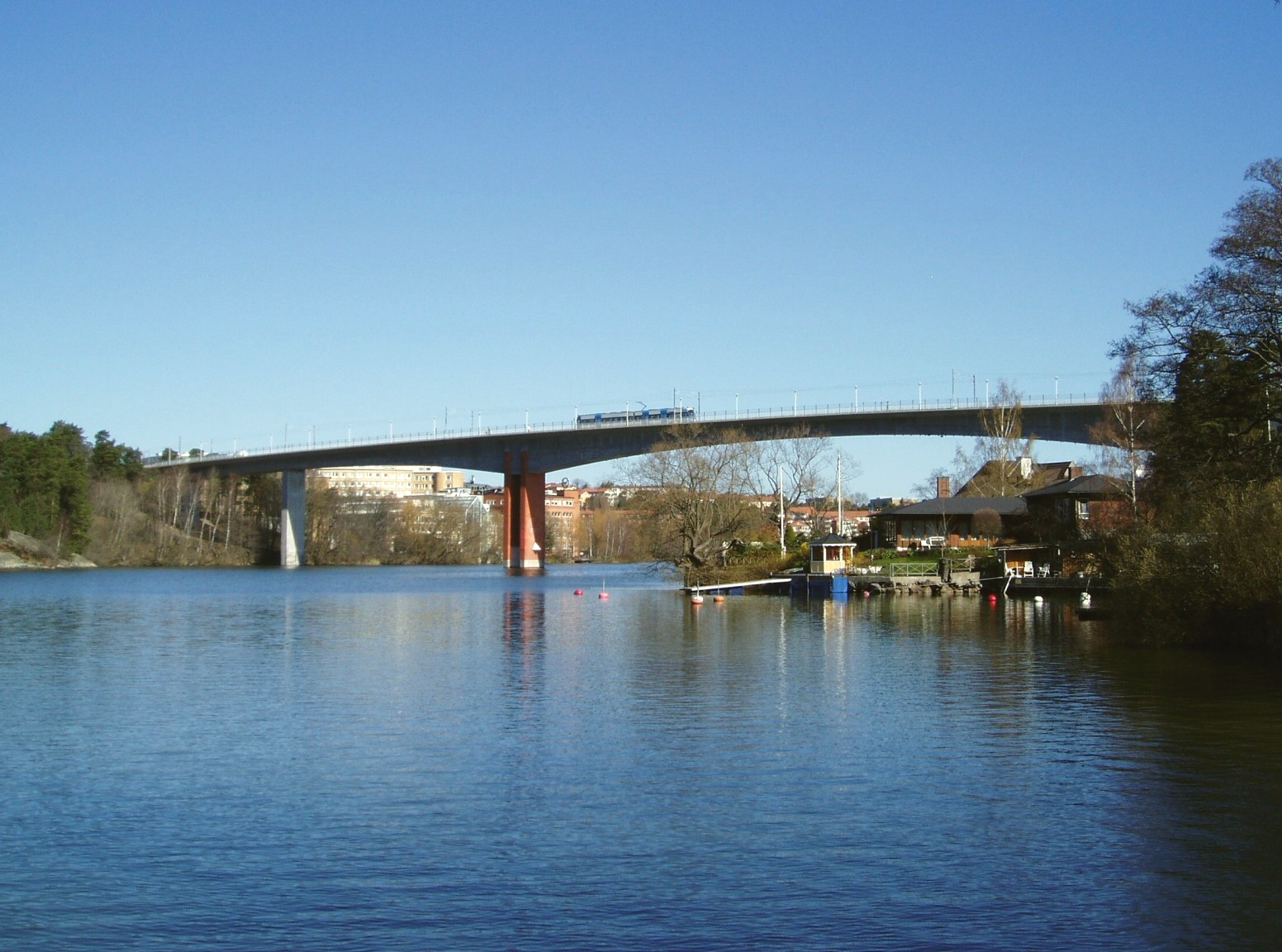 Alviksbron, bridge in Stockholm